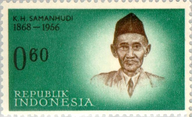 Samanhudi